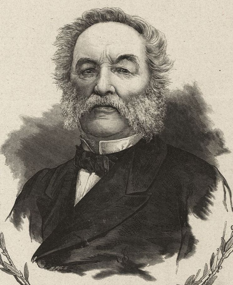 Adam Idźkowski